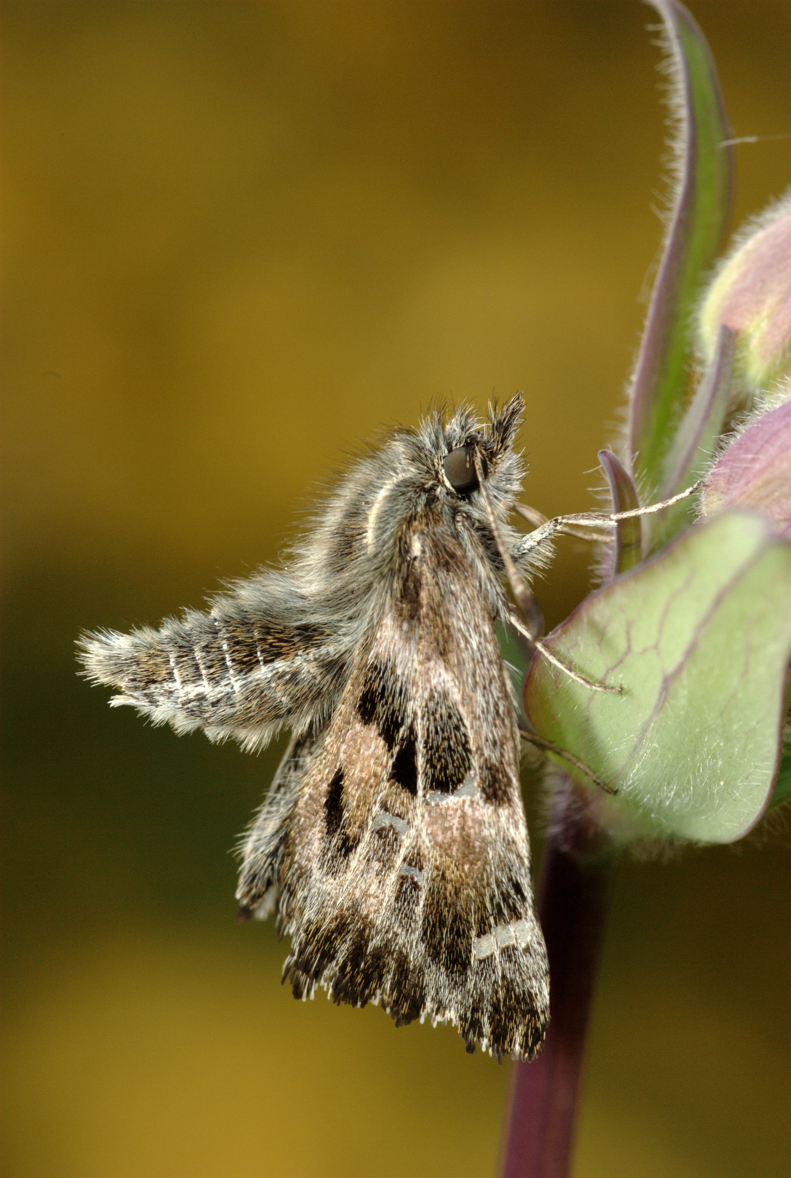 Hespérie de la passe-rose ou Grisette ou de l'Altée, en Normandie.